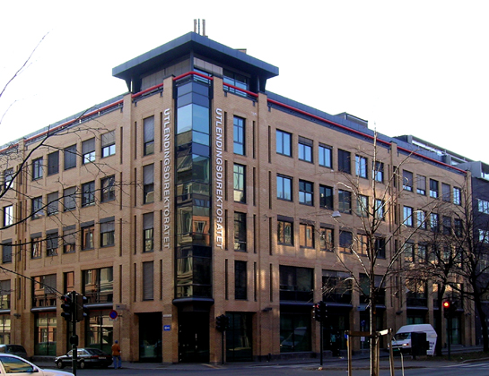 Utlendingsdirektoratet. Hausmanns gate, Oslo.